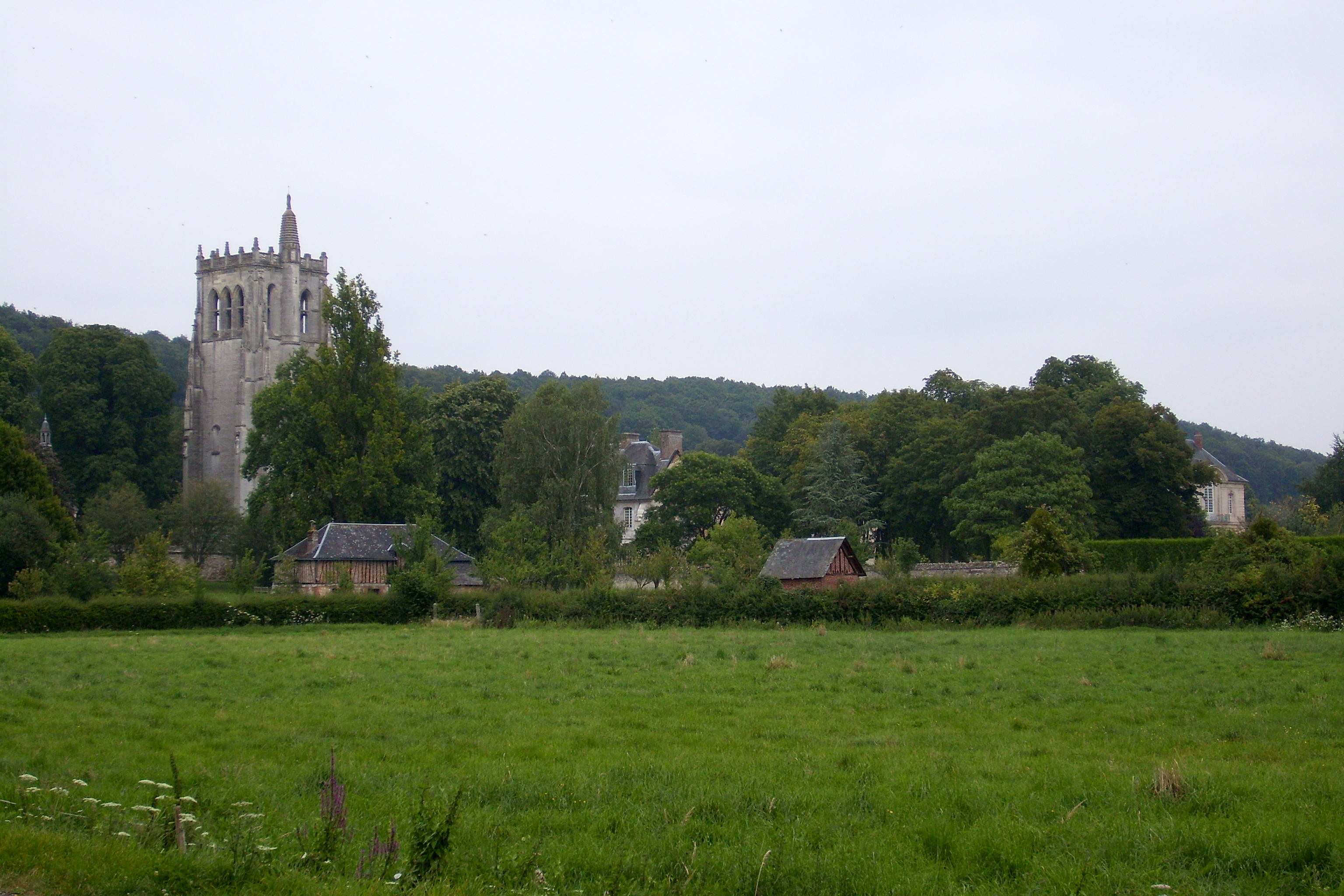 Vue de l'abbaye du Bec depuis la vallée du bec. Tour Saint-Nicolas et bâtiments conventuels.